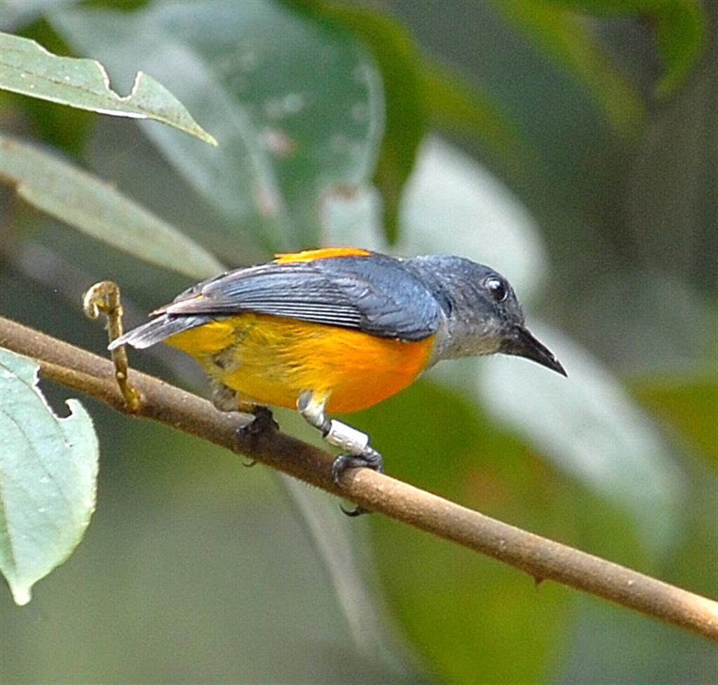 Orange-bellied Flowerpecker